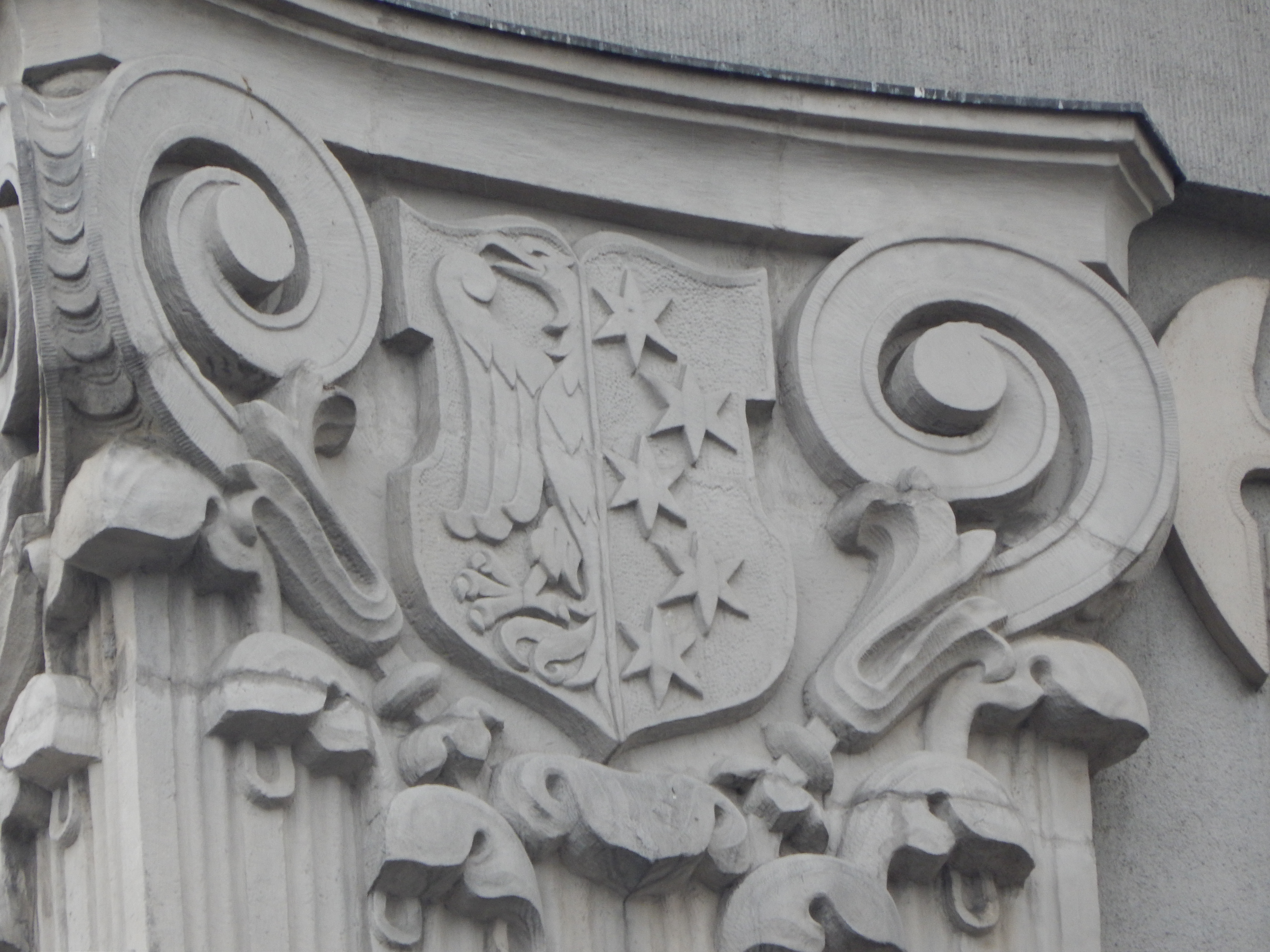 Fragment elewacji gmachu Sejmu Śląskiego - herb Lublińca